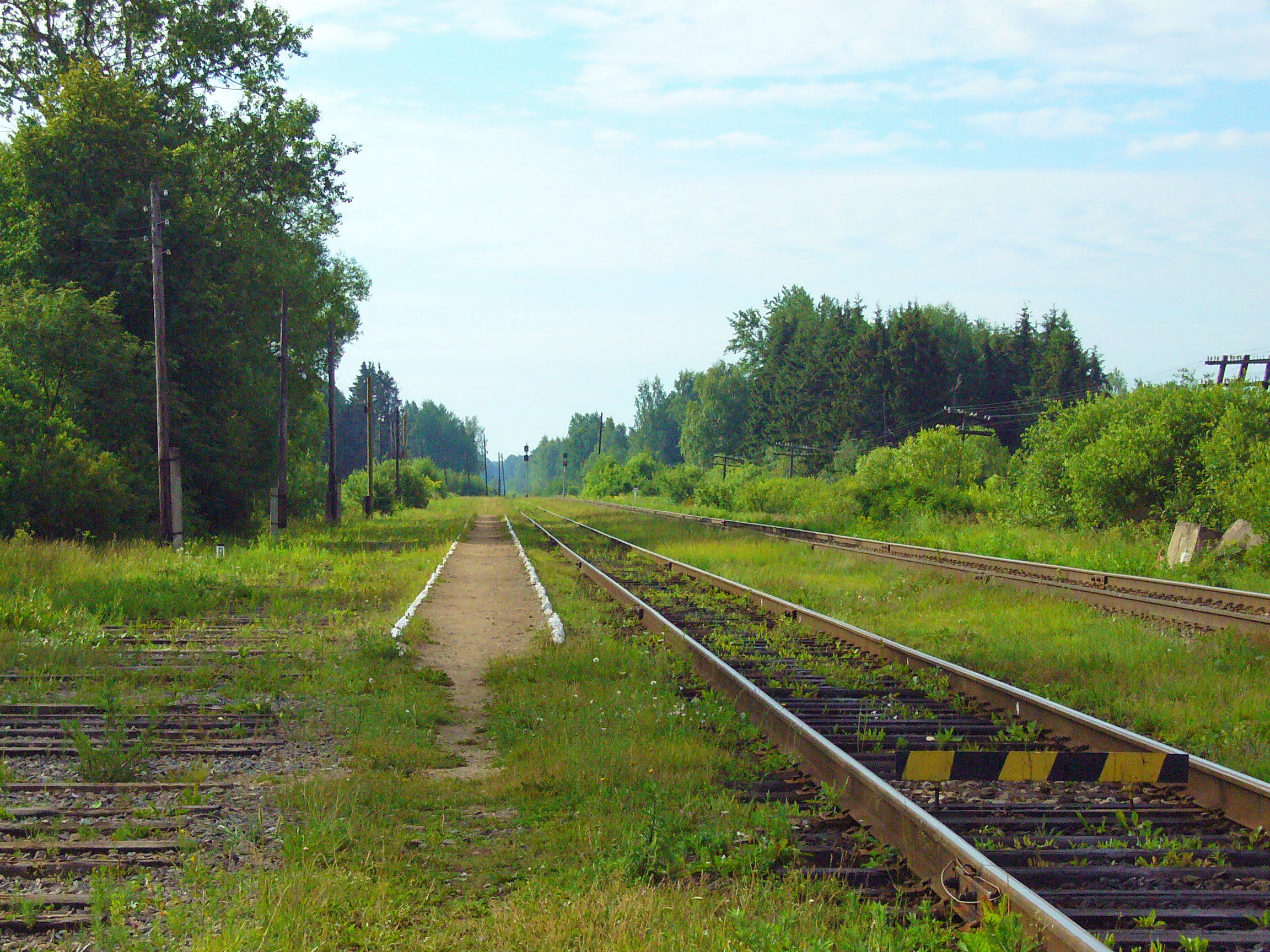 Станция МЮД